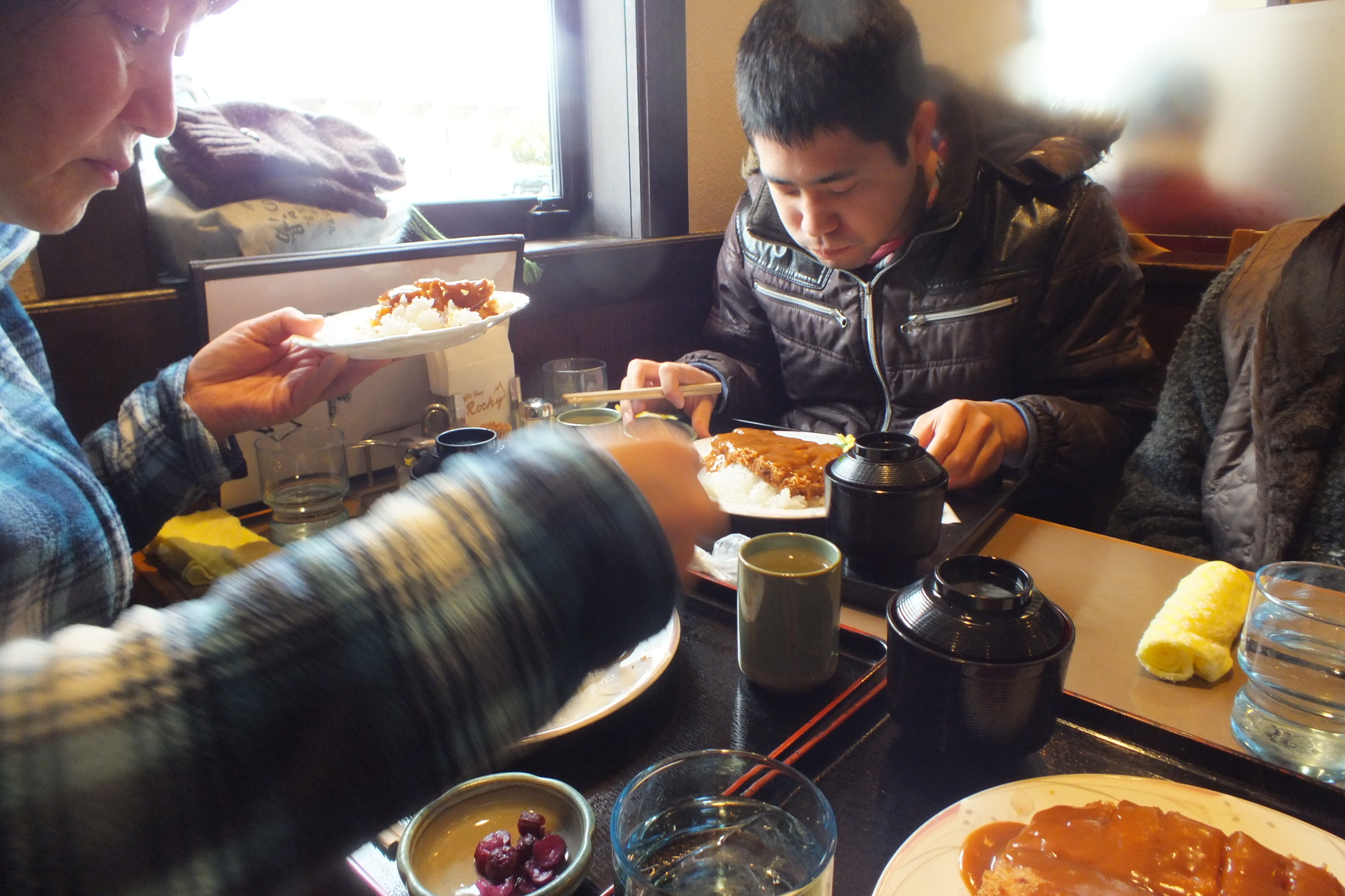 Katsu-meshi of Rocky かつめし（加古川「ロッキー」）